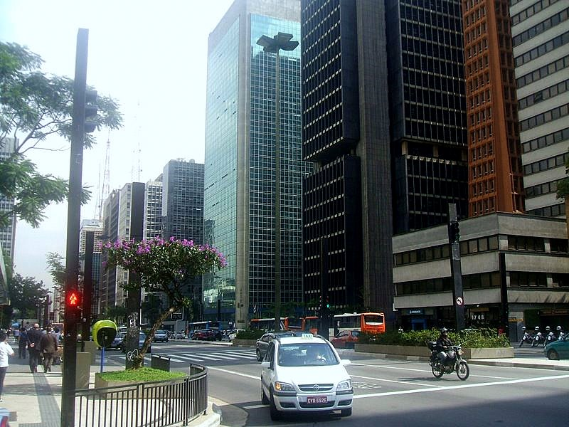 Avenida Paulista, São Paulo, Brasil.